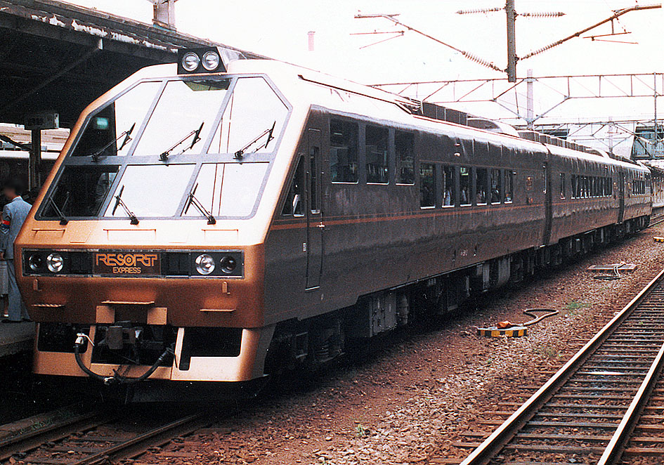 JR北海道 キハ59アルファコンチネンタルエクスプレス「リゾートエクスプレス」